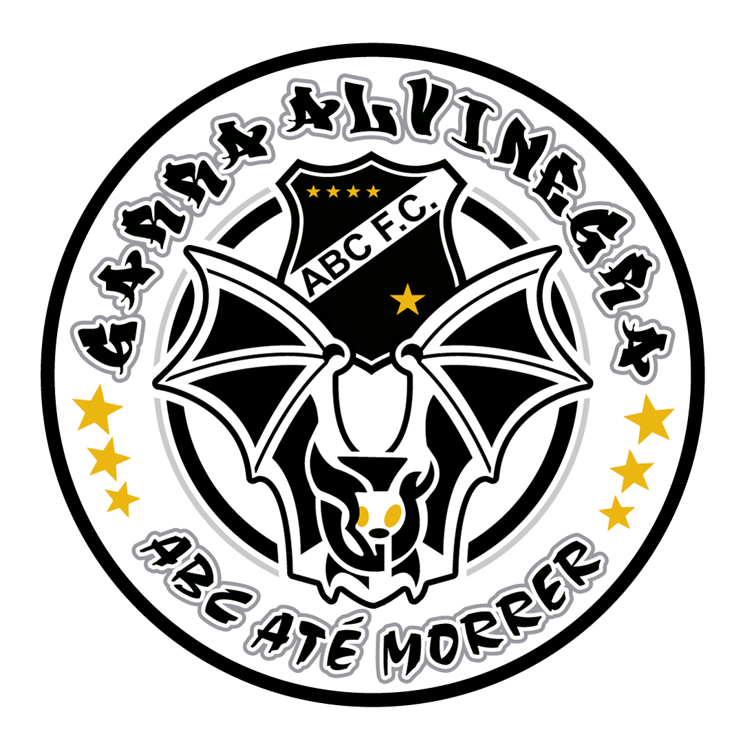 TGA - Escudo Oficial